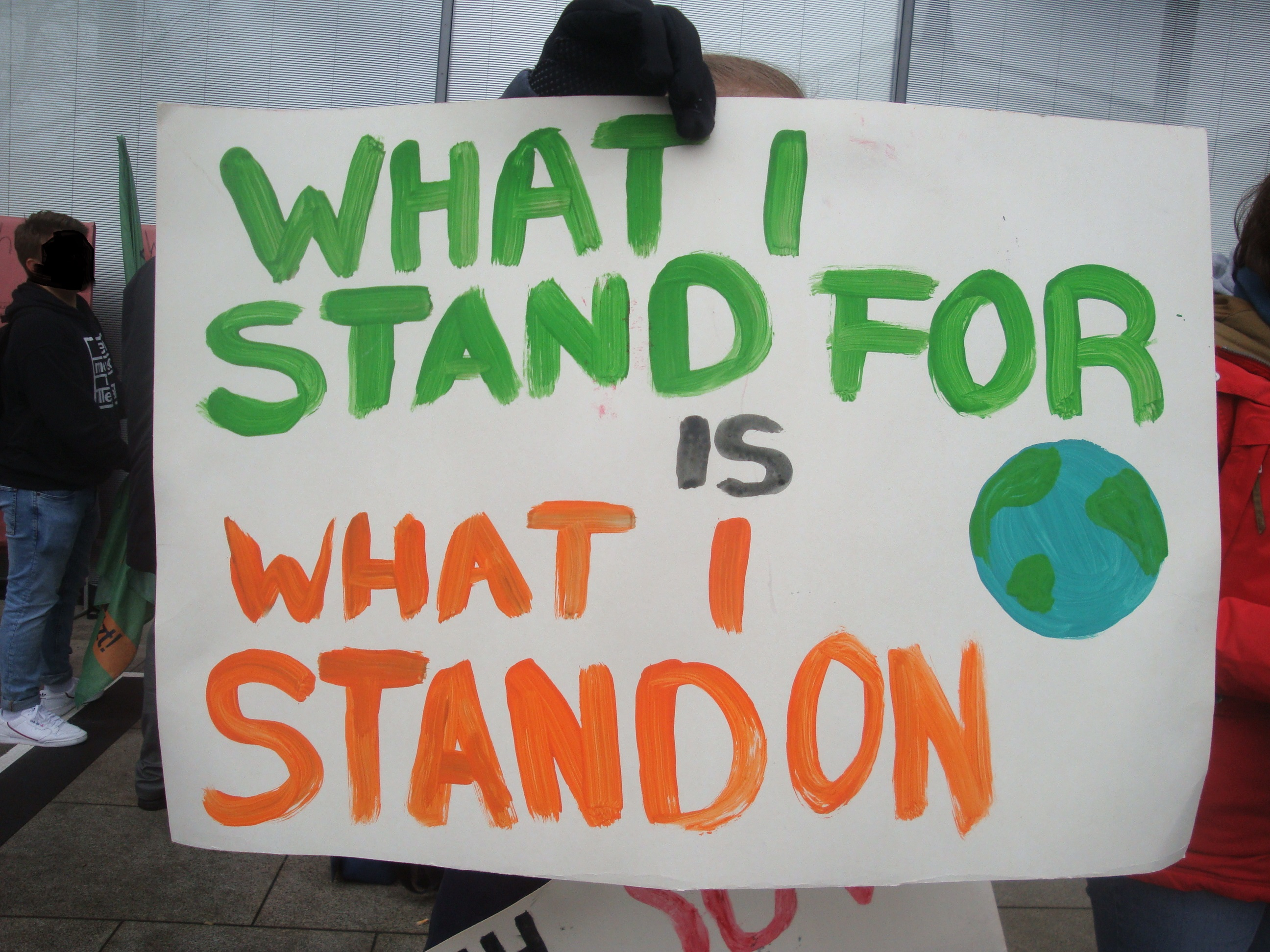 Fridays for Future, Demo in Aschaffenburg, 15.03.2019